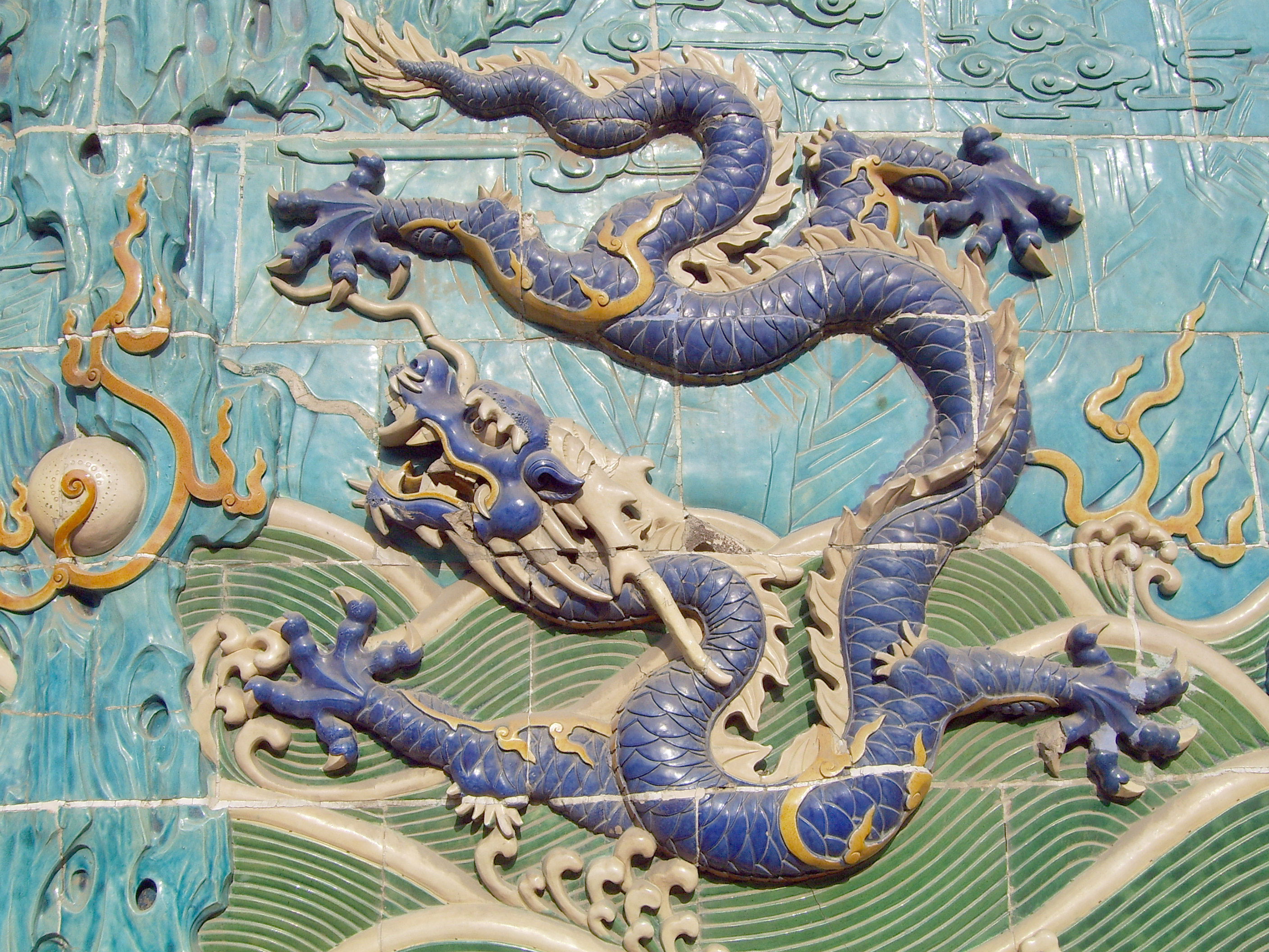 北海九龙壁之一